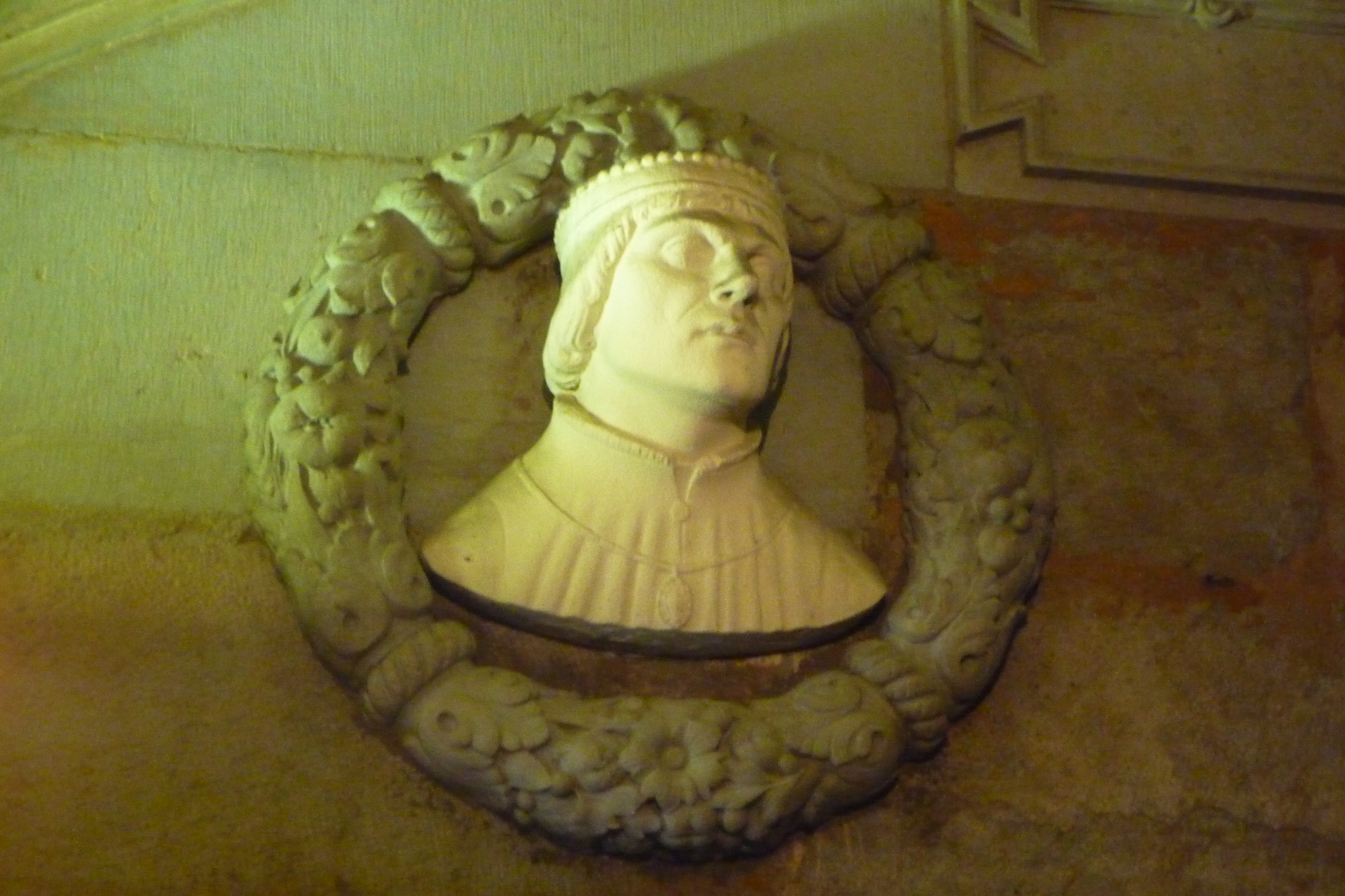 buste dauphin Humbert II - parlement du Dauphiné - Grenoble